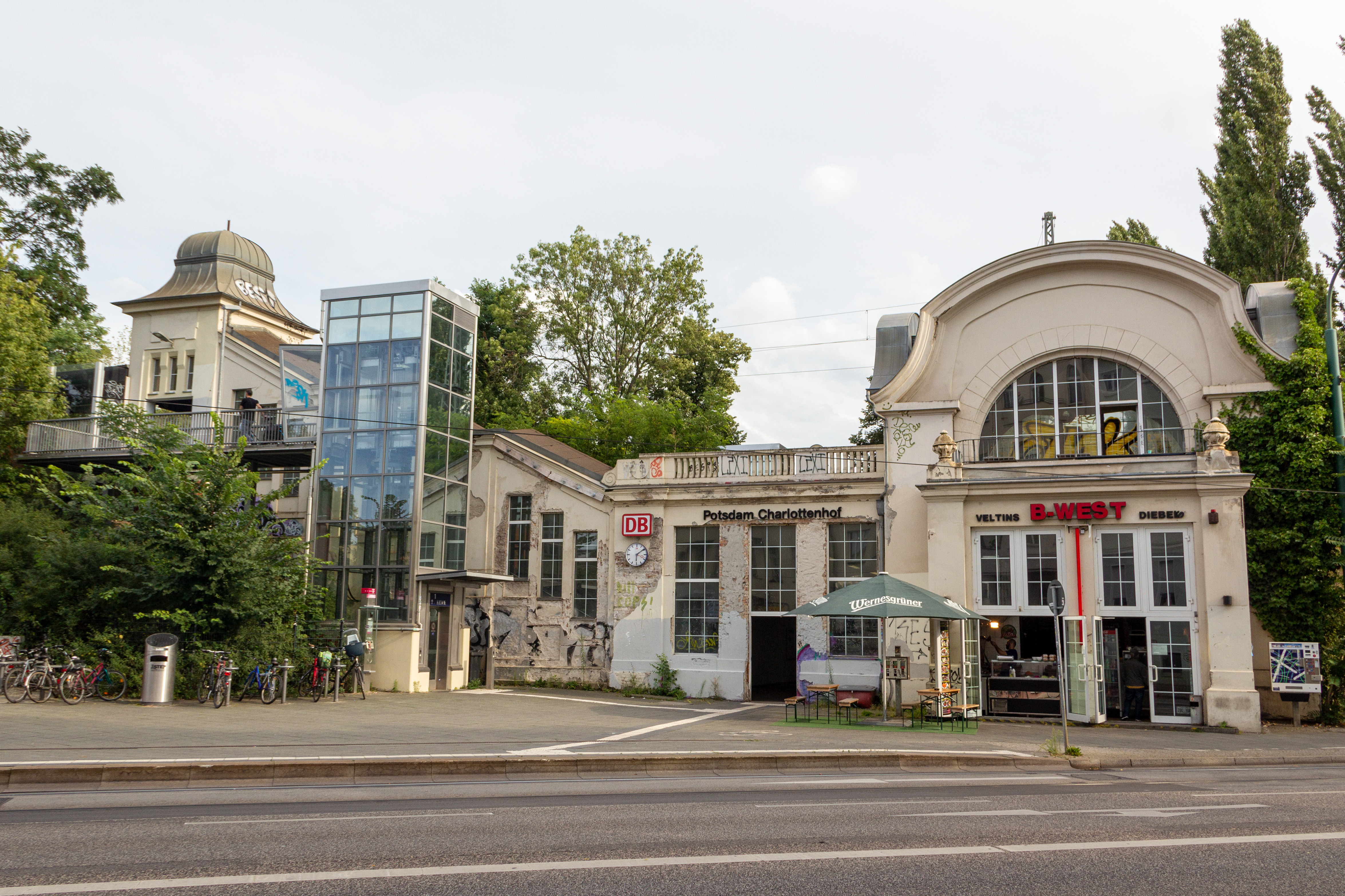 Empfangsgebäude des Bahnhofs Potsdam Charlottenhof mit Imbiss B-West. Im Vordergrund die Zeppelinstraße.